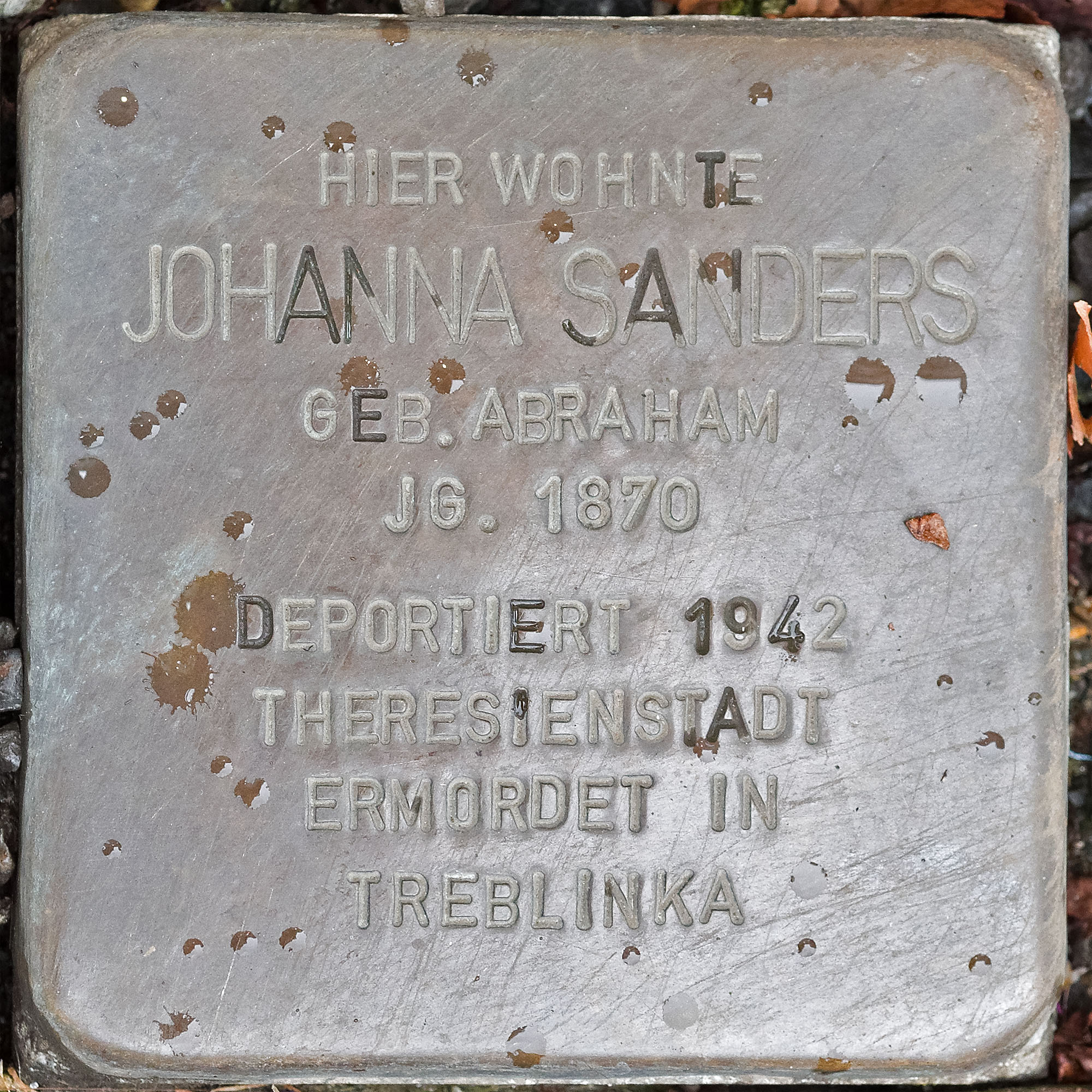 Stolpersteine Straelen: Sanders, Johanna